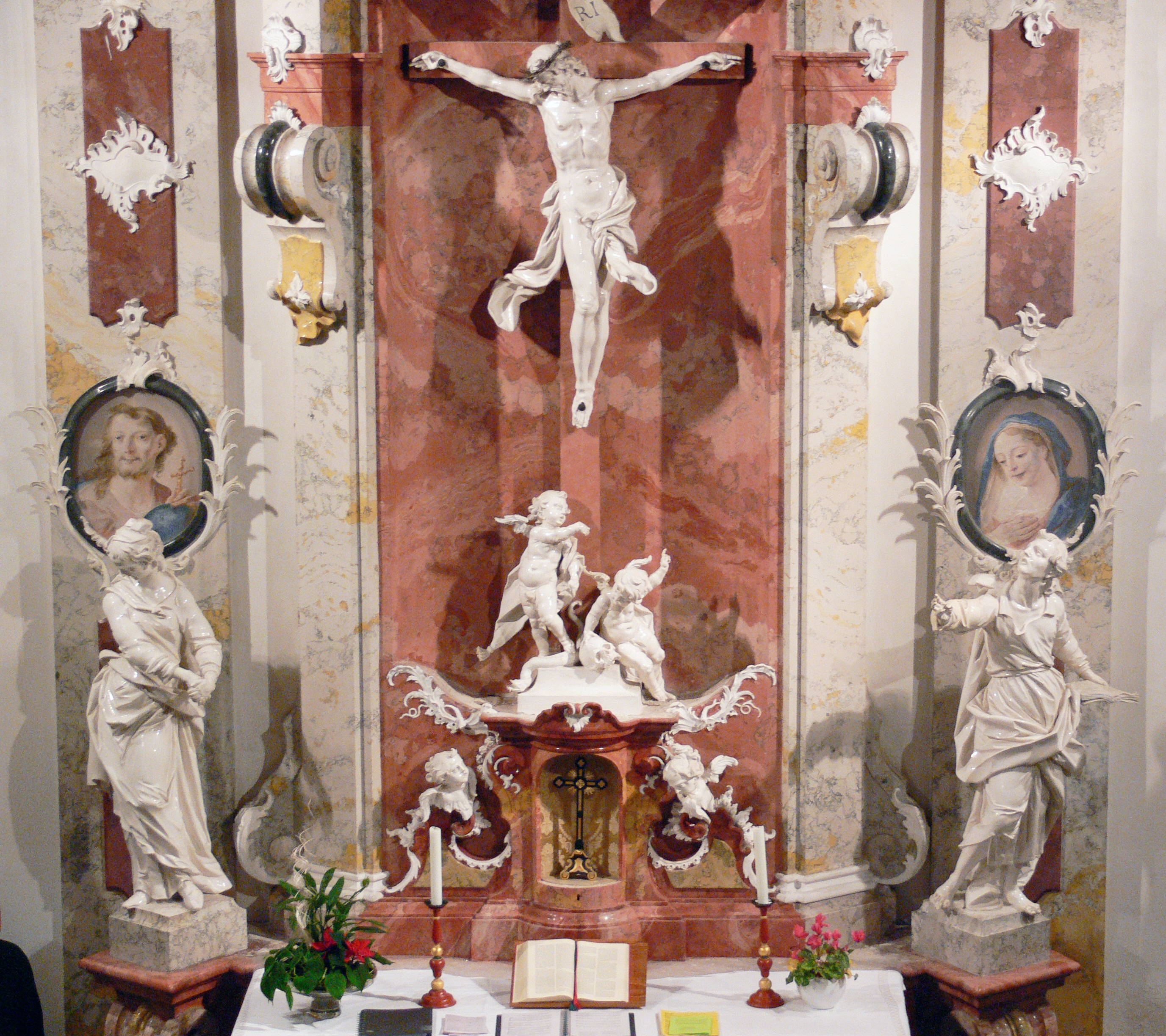 Schlosskirche (heute ev. Pfarrkirche), Neues Schloss Meersburg Altar von Joseph Anton Feuchtmayer, 1741–1743: Kreuzigungsgruppe (Maria, Kruzifix, Johannes) Tabernakel mit Putten (diese ursprünglich mit den Leidenswerkzeugen Christi) Joseph Anton Feuchtmayer (1696–1770) Description German sculptor Date of birth/death6 March 16962 January 1770Location of birth/deathLinzMimmenhausen bei Salem (Baden)Work locationOberschwabenAuthority controlVIAF: 69721226 | LCCN: n84189350 | GND: 118532707 | WorldCat | WP-Person